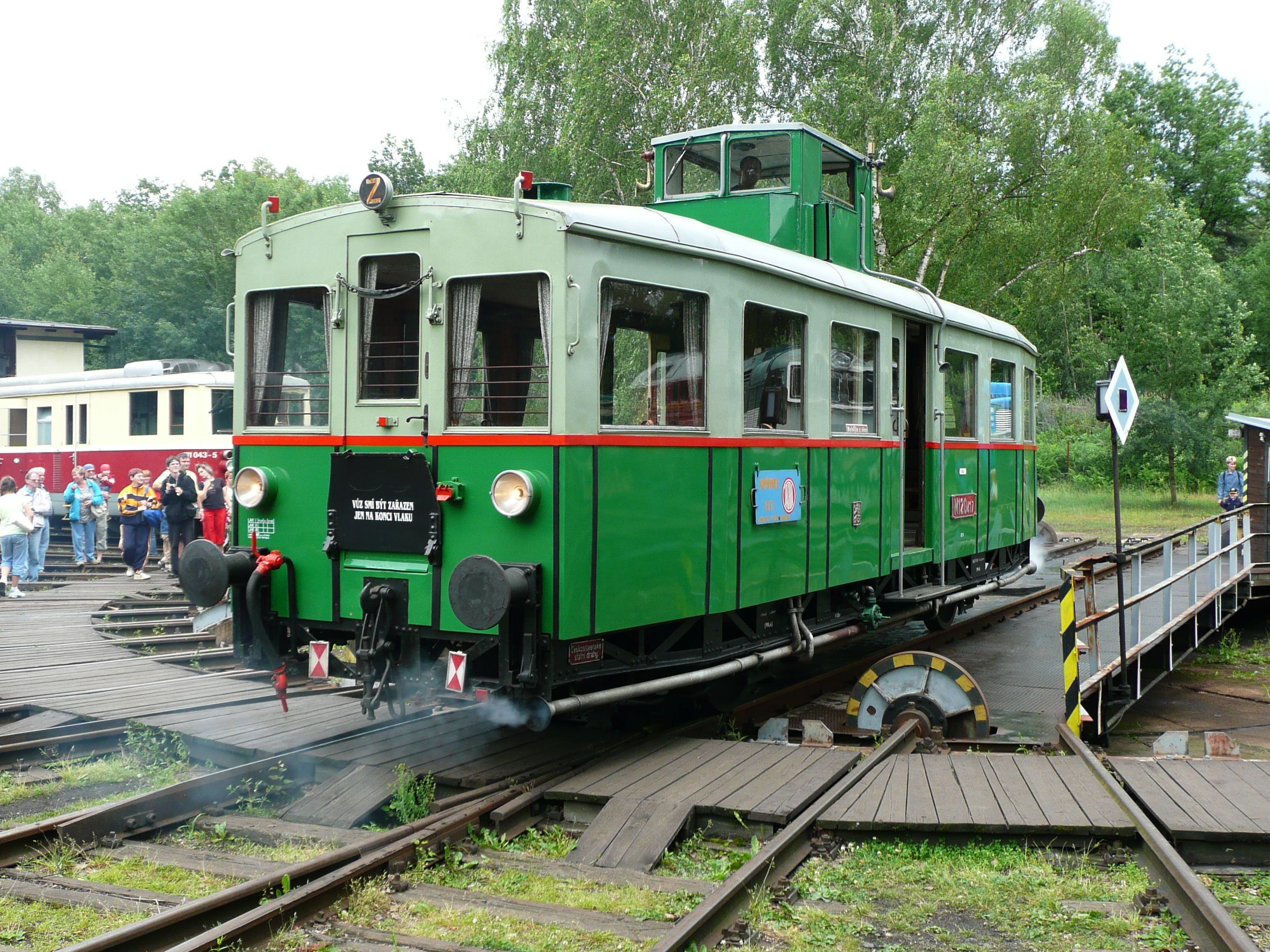 M120.417 auf der Drehscheibe im Eisenbahnmuseum Lužná u Rakovníka